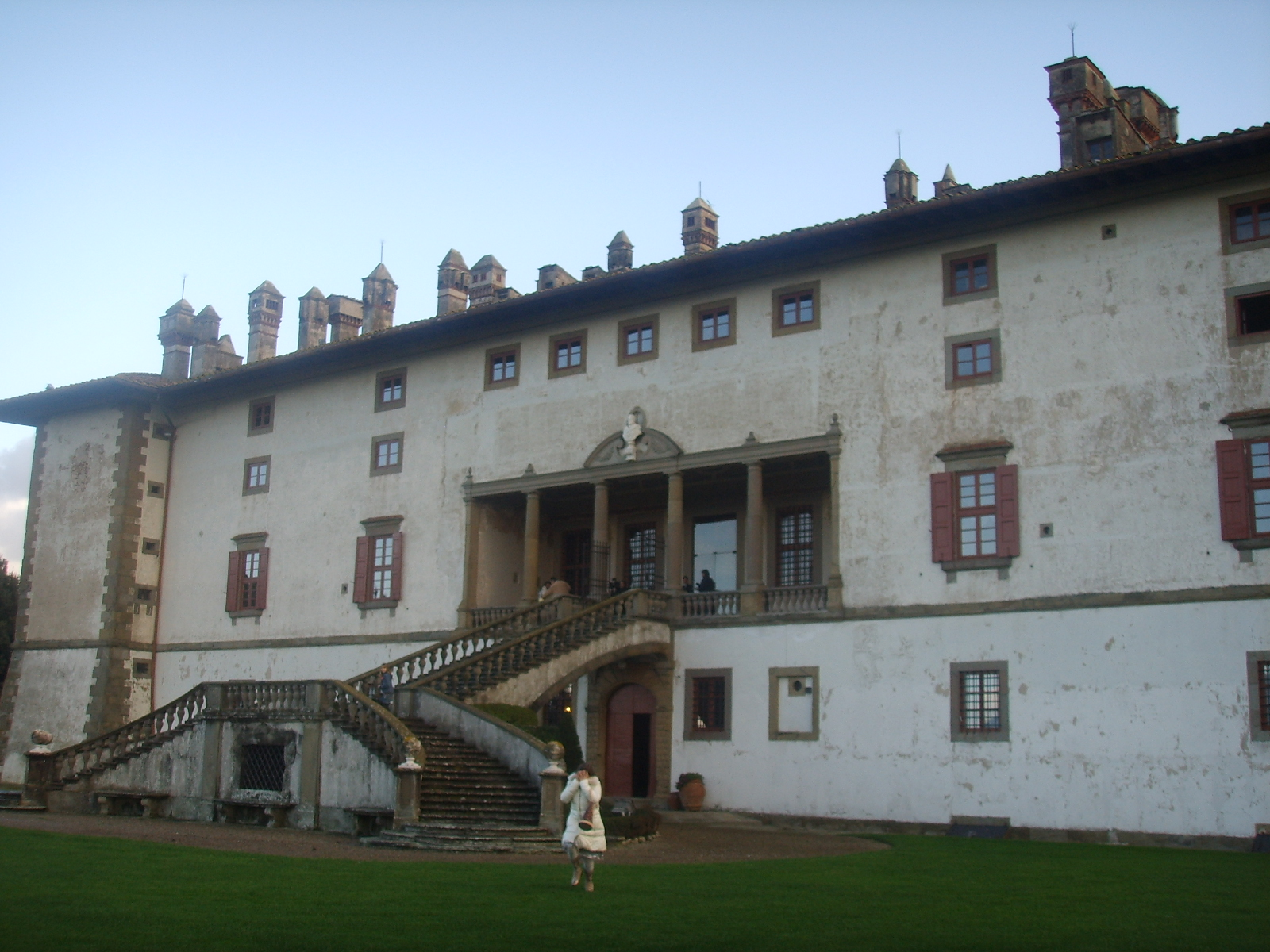 Villa_di_Artimino Medici villa in Artimino